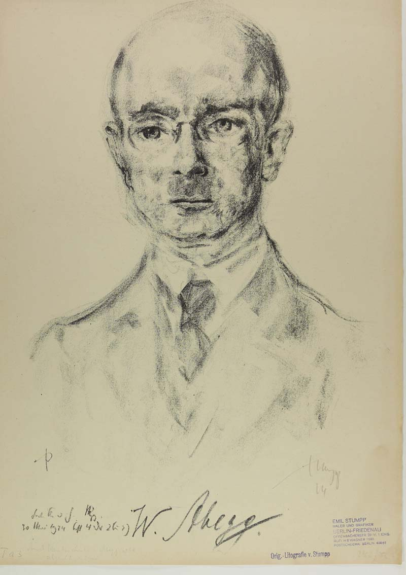 Porträt des preußischen Staatssekretärs Wilhelm Abegg von Emil Stumpp (1924)